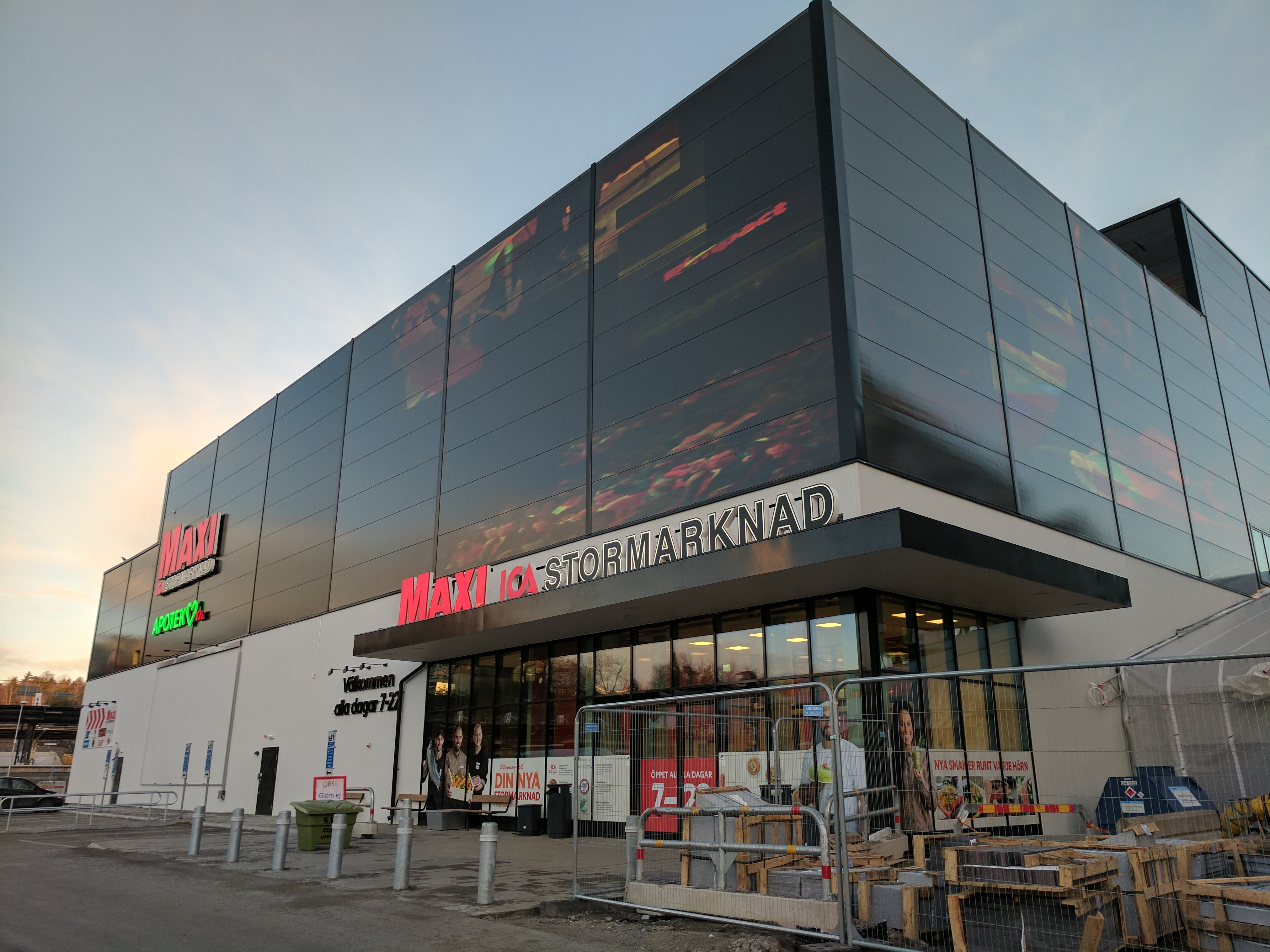 ICA Maxi Flemingsberg